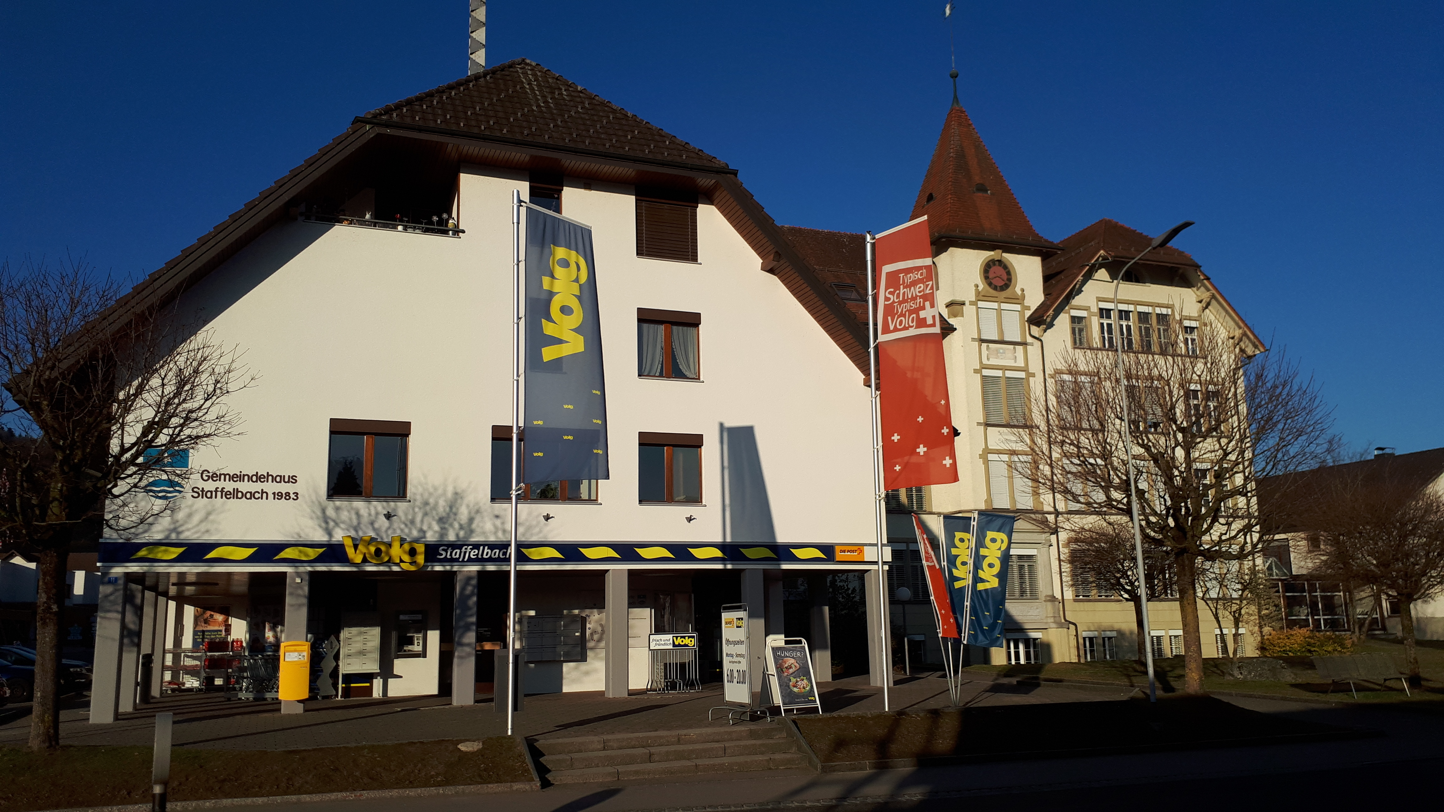 Staffelbach (Aargau) Dorfzentrum mit Gemeindehaus und Schulhaus